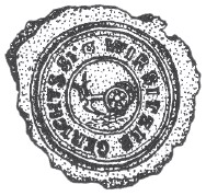 Wappen von Wirbitz (Oderberg) Česky: Znak Vrbic (Bohumín)